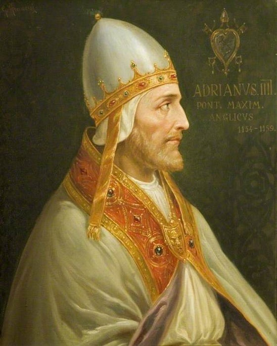 IV. Adorján (St Albans, 1100 – Anagni, 1159)